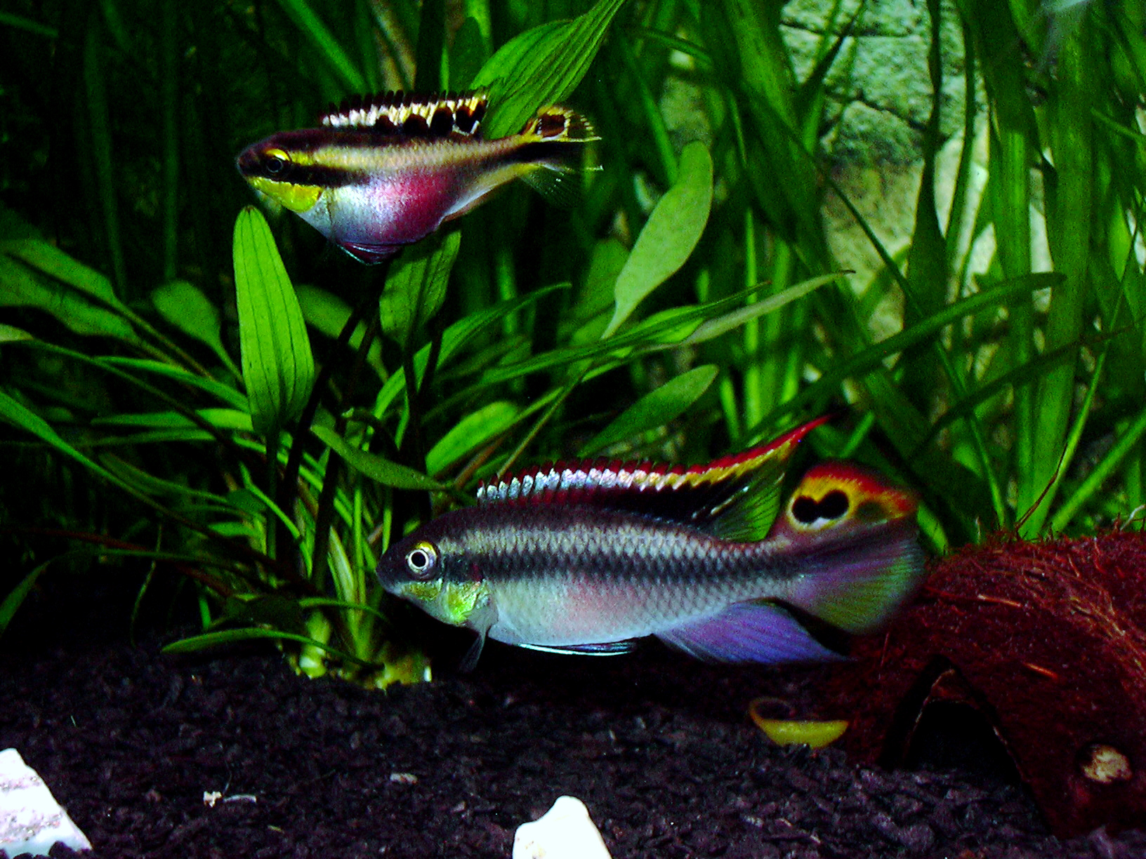 geen auteursrechtensituatie, zelf gemaakt